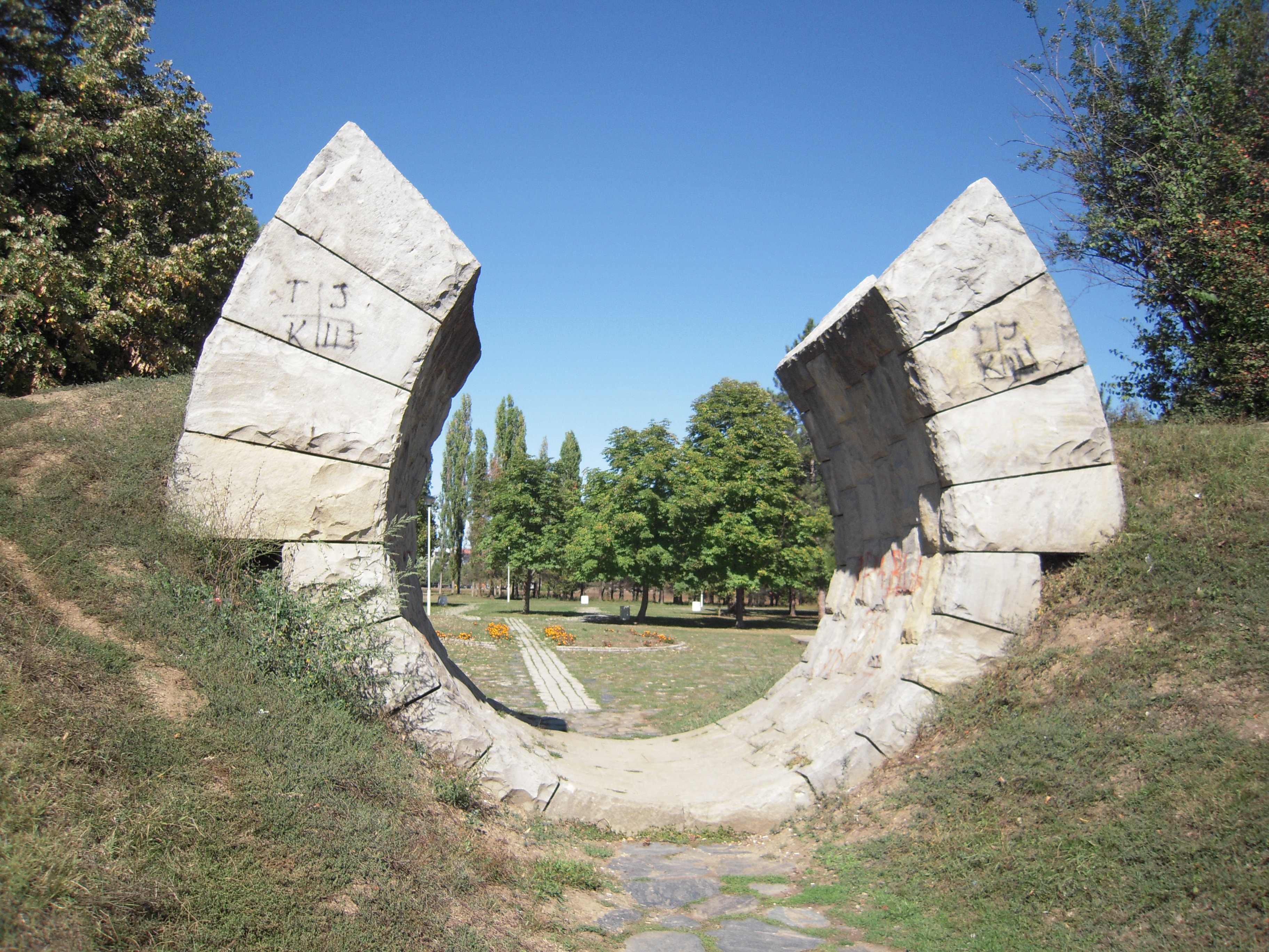 Меморијални комплекс „Слободиште“ у Крушевцу